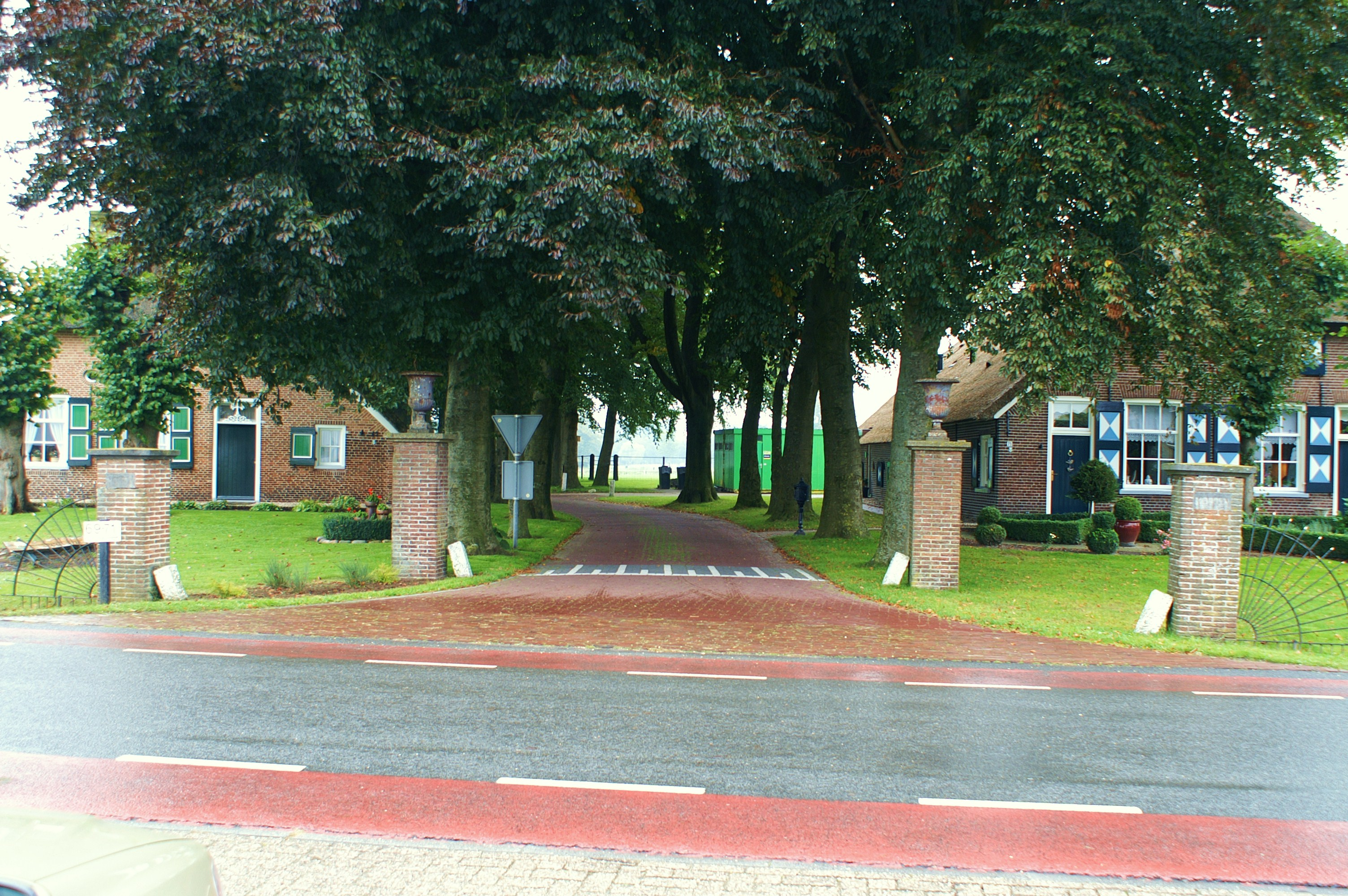 Hekpijlers tot landgoed Huis Morren te Oosterwolde.